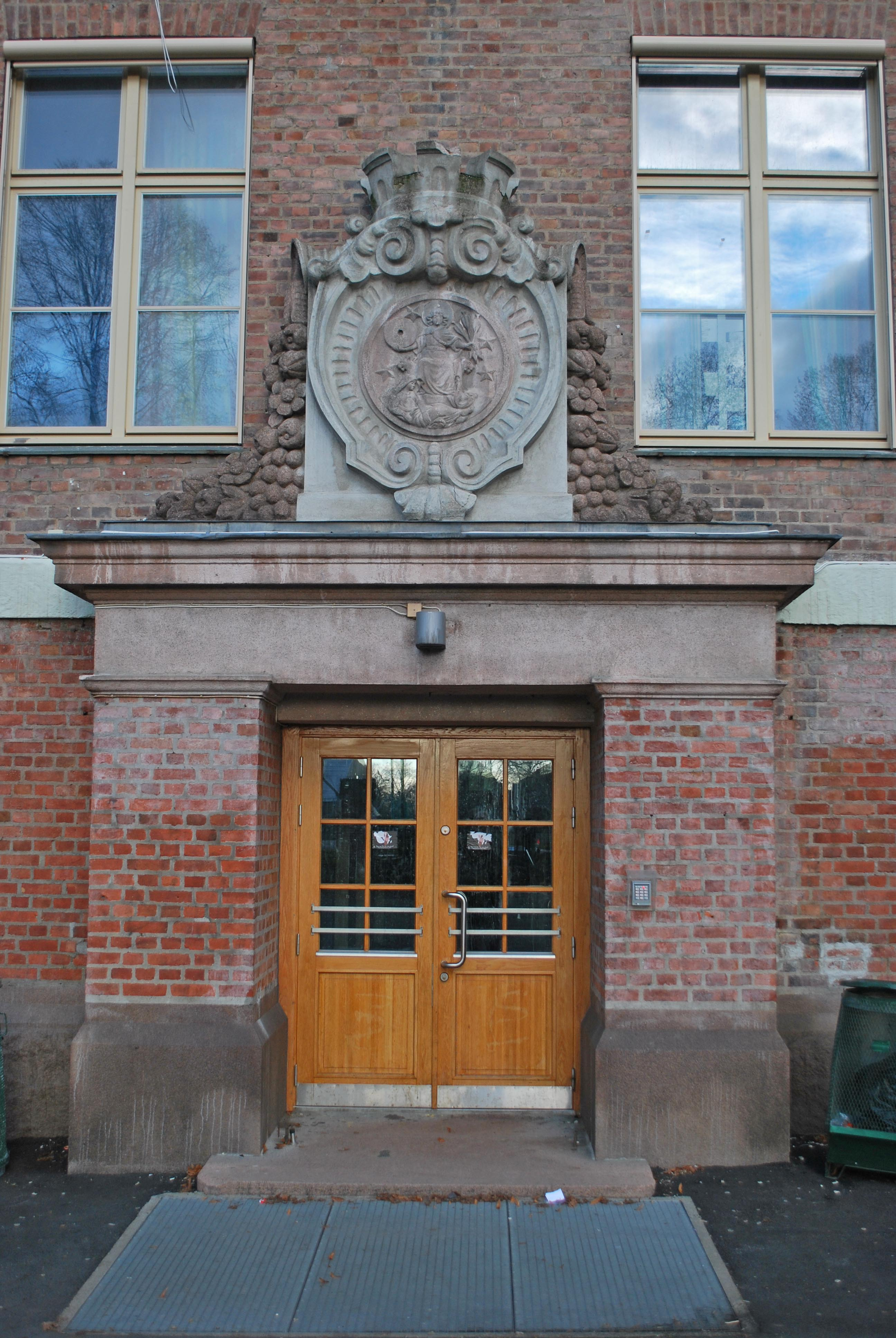 Fagerborg videregående skole, inngang